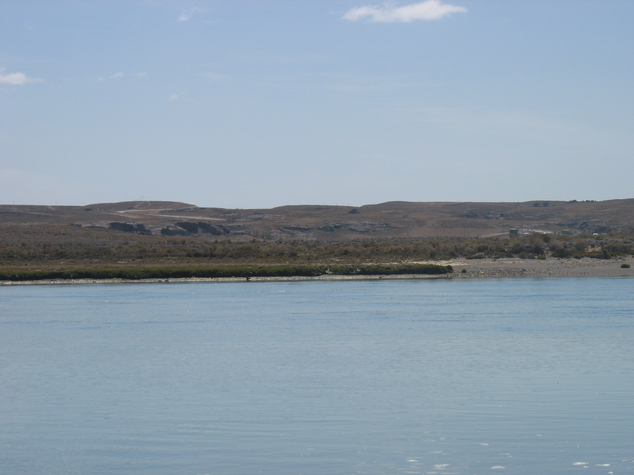 Vista de la costa sur de la isla Elena (Ría Desado, Patagonia Argentina)